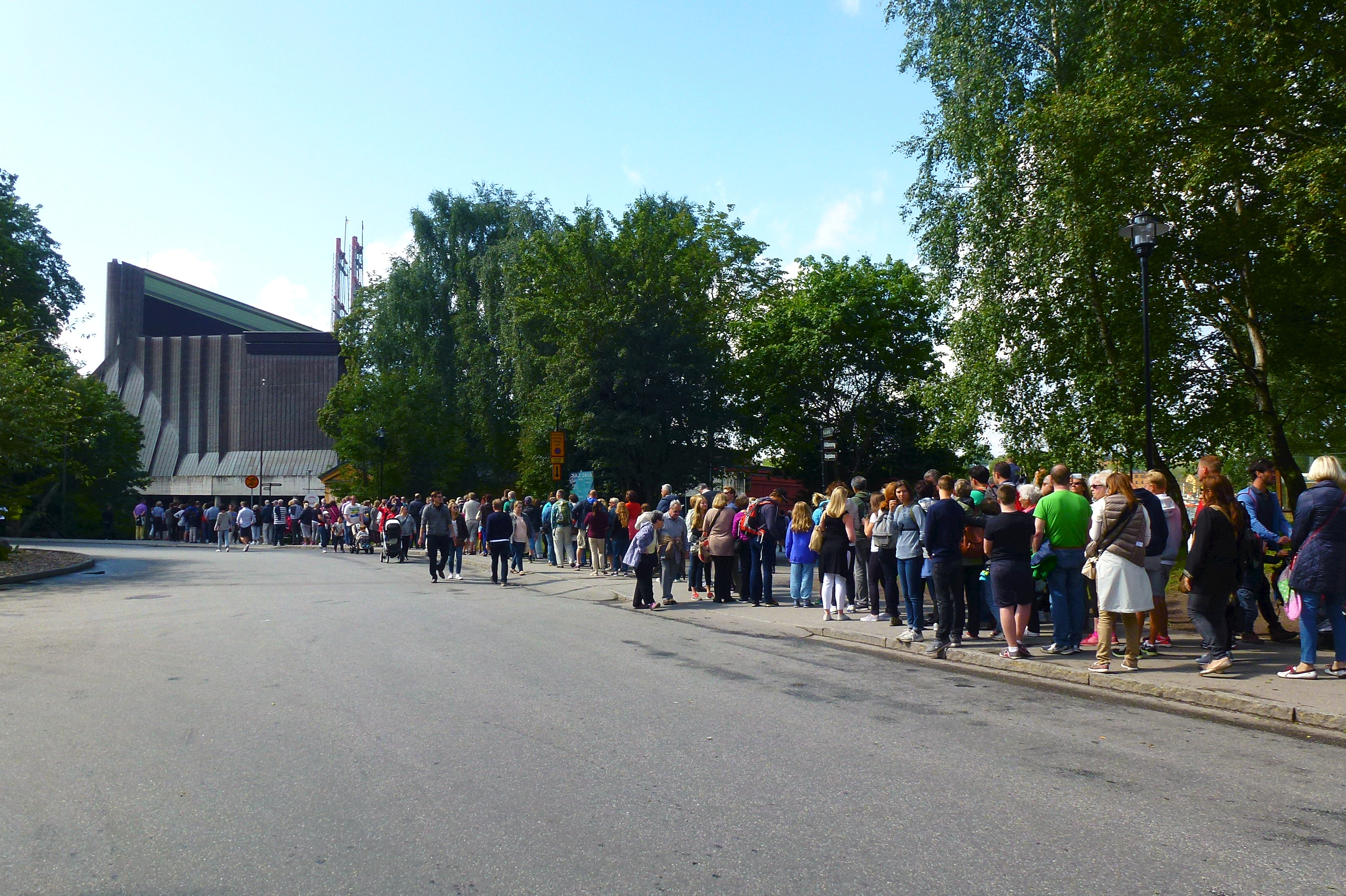 Kö till Vasamuseet